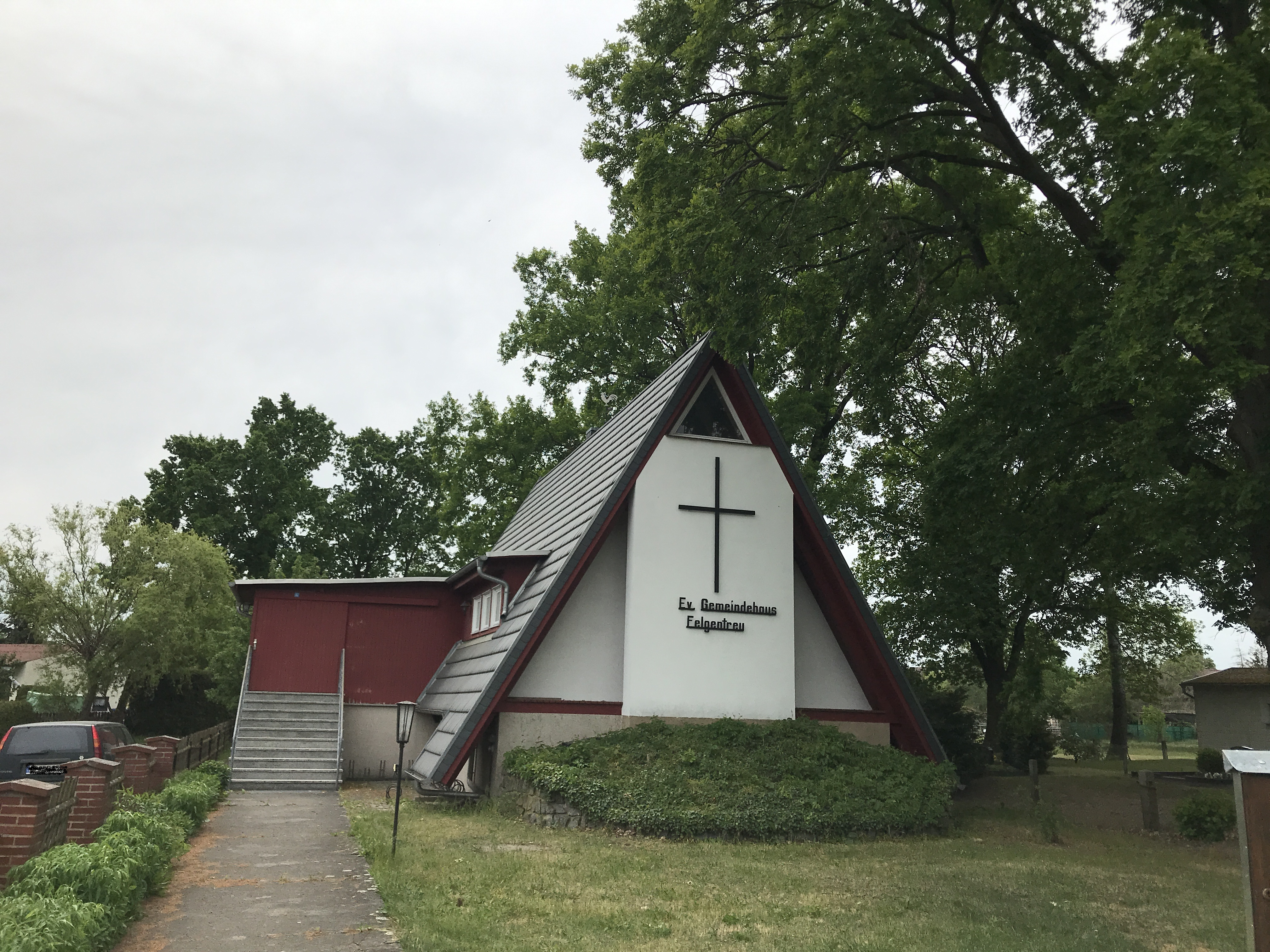 Die Dorfkirche Felgentreu in der Gemeinde Nuthe-Urstromtal ist eine neuzeitliche Saalkirche im Landkreis Teltow-Fläming in Brandenburg. Die Kirchenausstattung ist neuzeitlich.